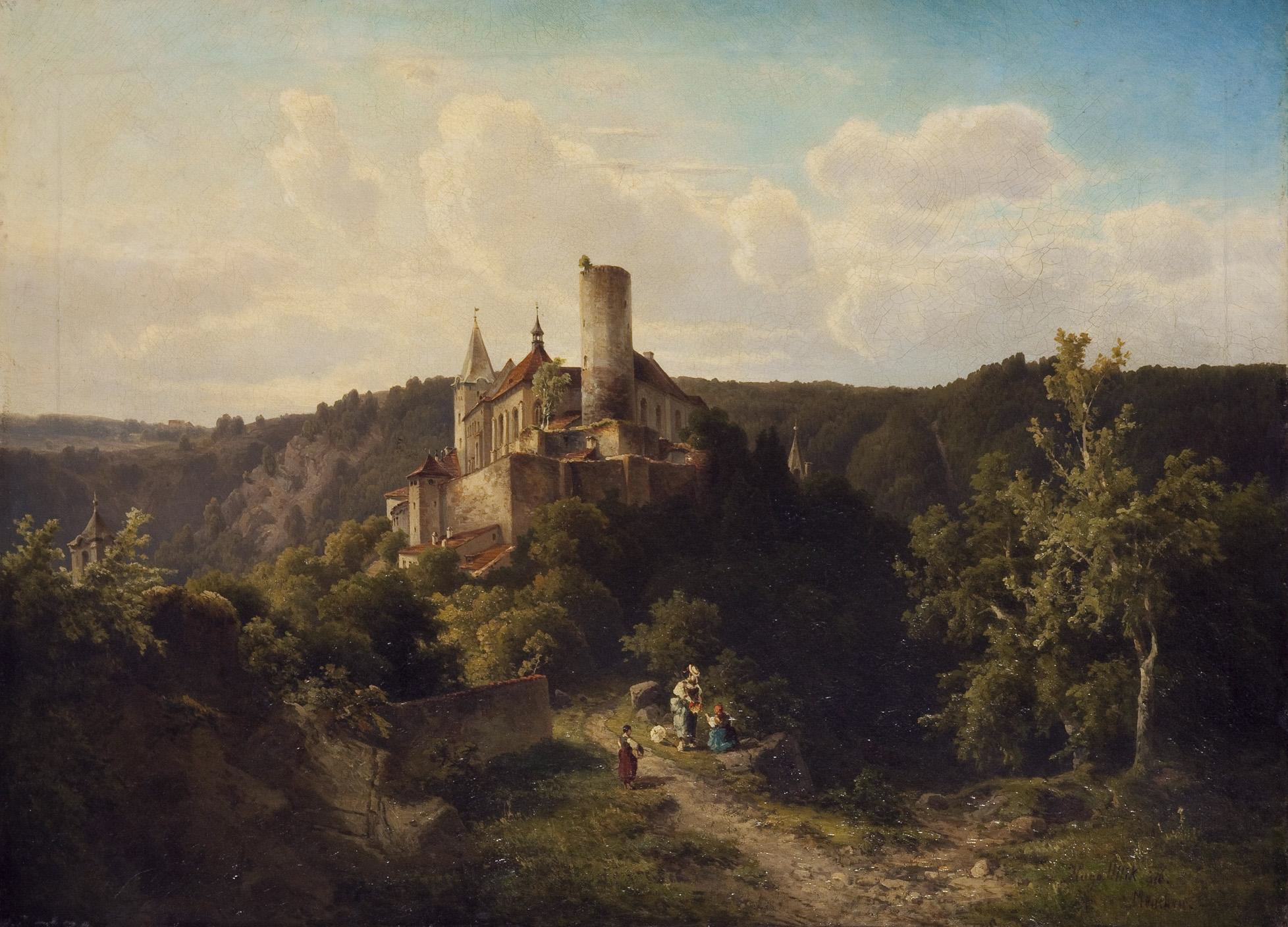 Landschaft mit der Burg Křivoklát (Pürglitz), rechts unten signiert, datiert und gekennzeichnet: Hugo Ullik 876 München, Öl/Leinwand, 55 x 75 cm